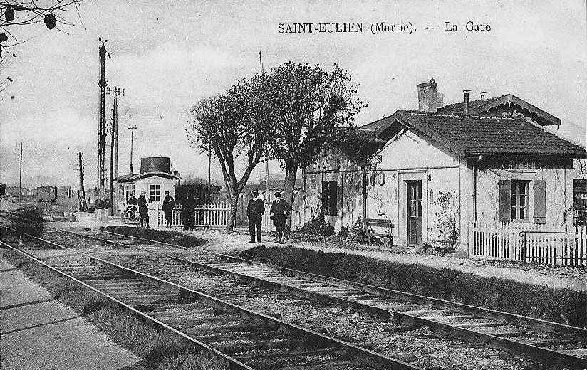 La gare de Saint-Eulien au début des années 1900.